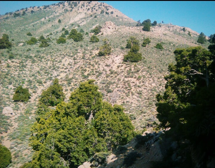 Аҧсшәа: سربیژن